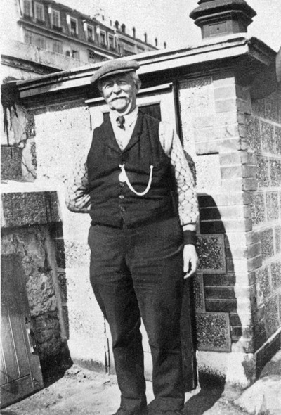 François Marc Delrieu, « gardien du phare et responsable de l'octroi », devant son local situé probablement sur le quai des Pâquis.